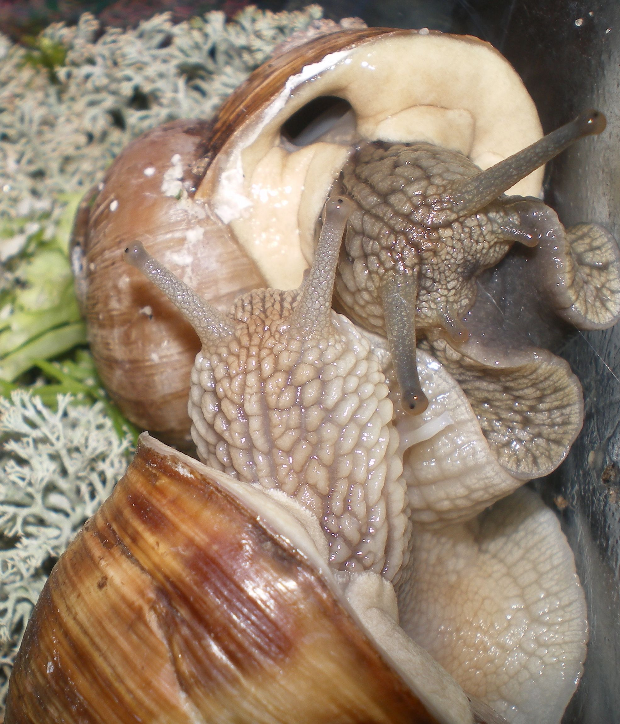 Расширение пневмостома у особи виноградной улитки Helix pomatia во время копуляции